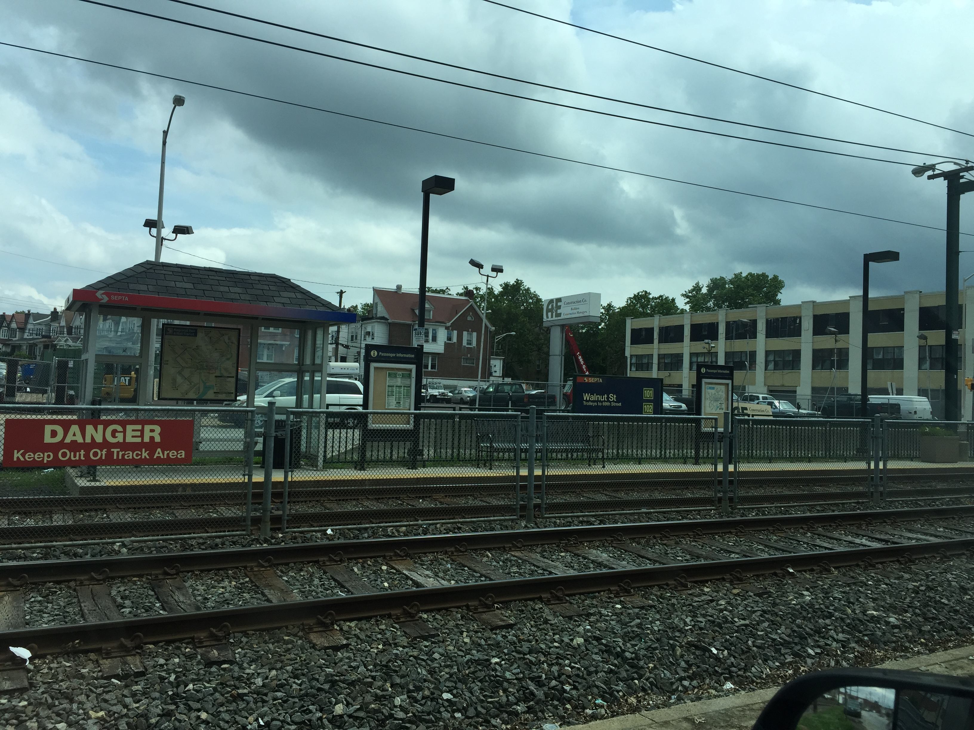 Avon road